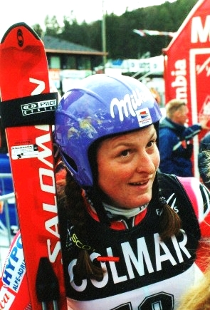 Janica Kostelić na Zlati lisici 2001 v Mariboru